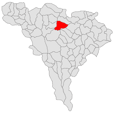 Categorie:Hărţi ale judeţului Alba